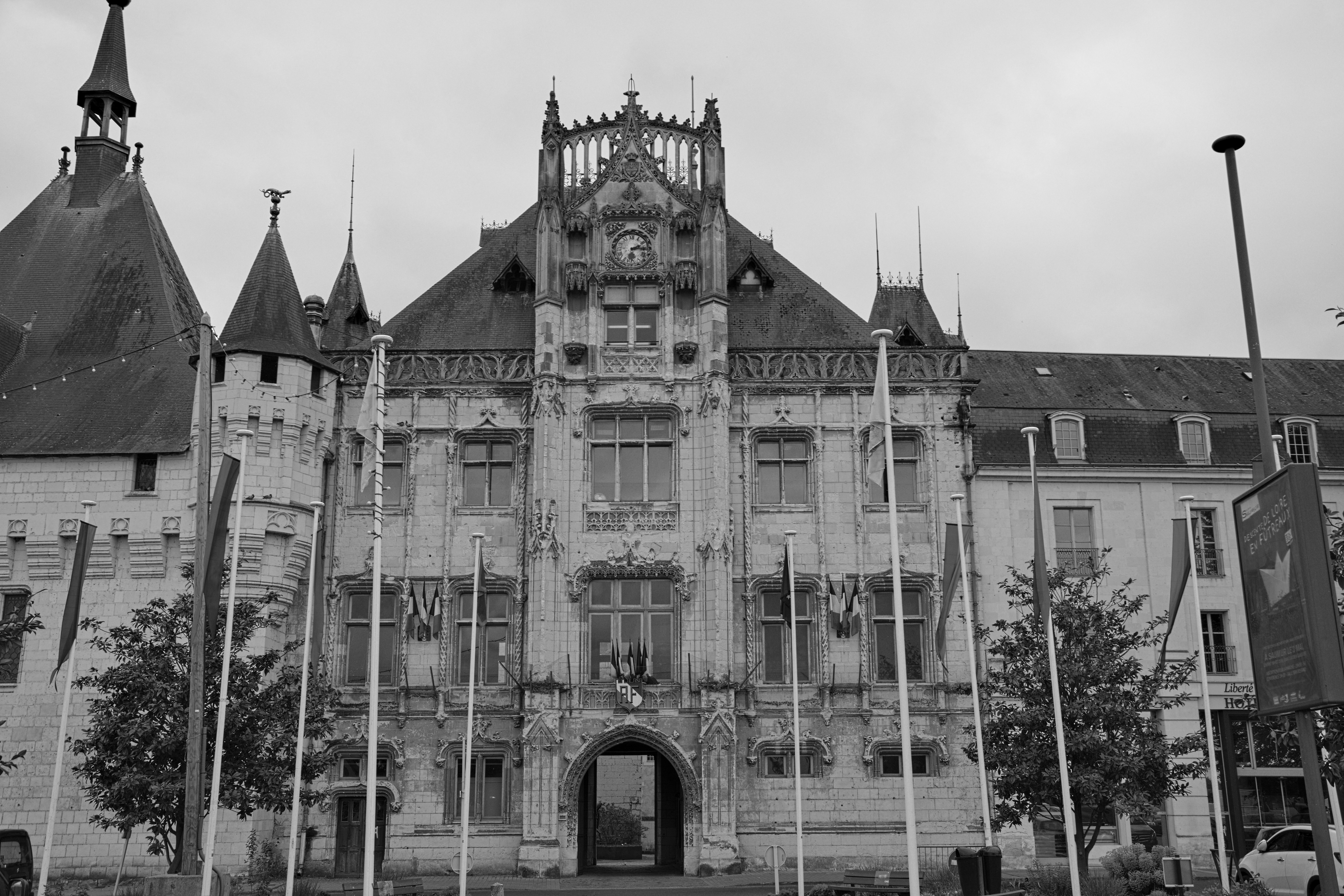 Nommé « Maison Commune », « Maison de Ville » puis Mairie et/ou Hôtel de Ville, ces bâtiments du XVIème XIXème et XXème siècles accueillent l’administration municipale depuis le début du XVIème siècle.